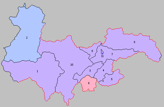 岐阜県大野郡（飛騨国）の町村制時点の町村。